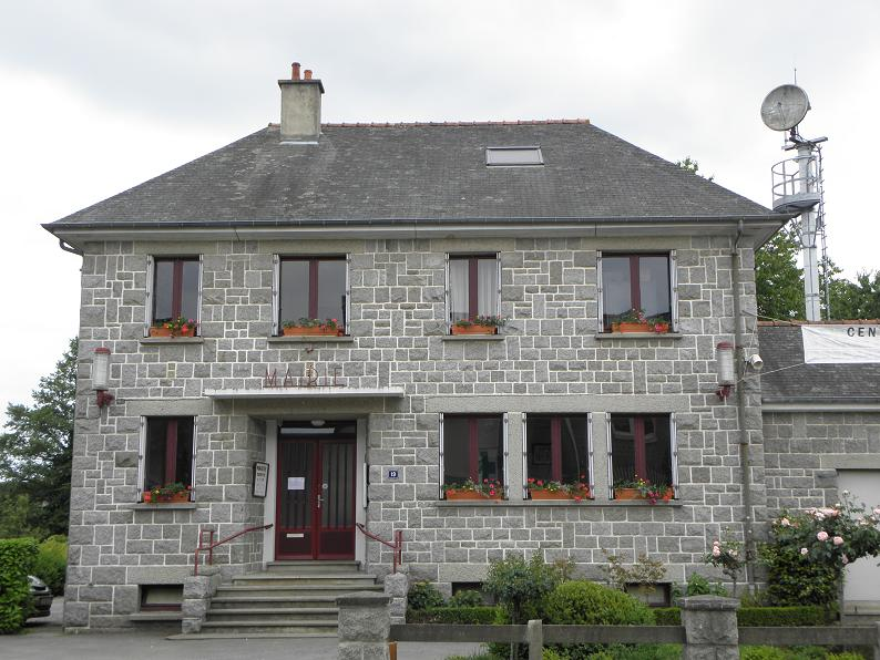 Mairie de Montreuil-sur-Ille (35).